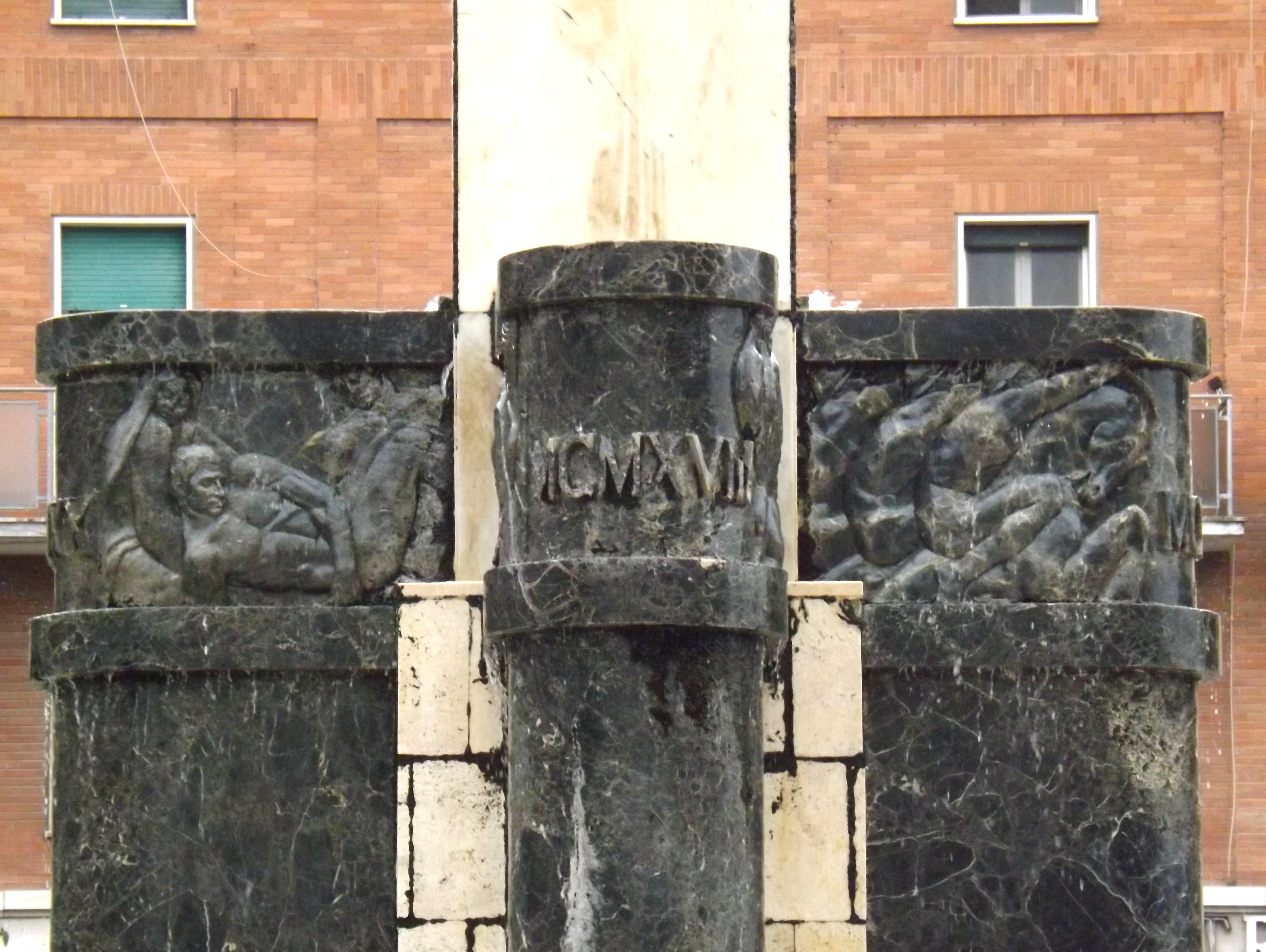 ENZO NENCI - SX: PIETA' DEL CADUTO, 1933 - DX: DIANA DELLA GUERRA, 1933